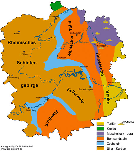 Vereinfachte Darstellung der Geologie im Geopark